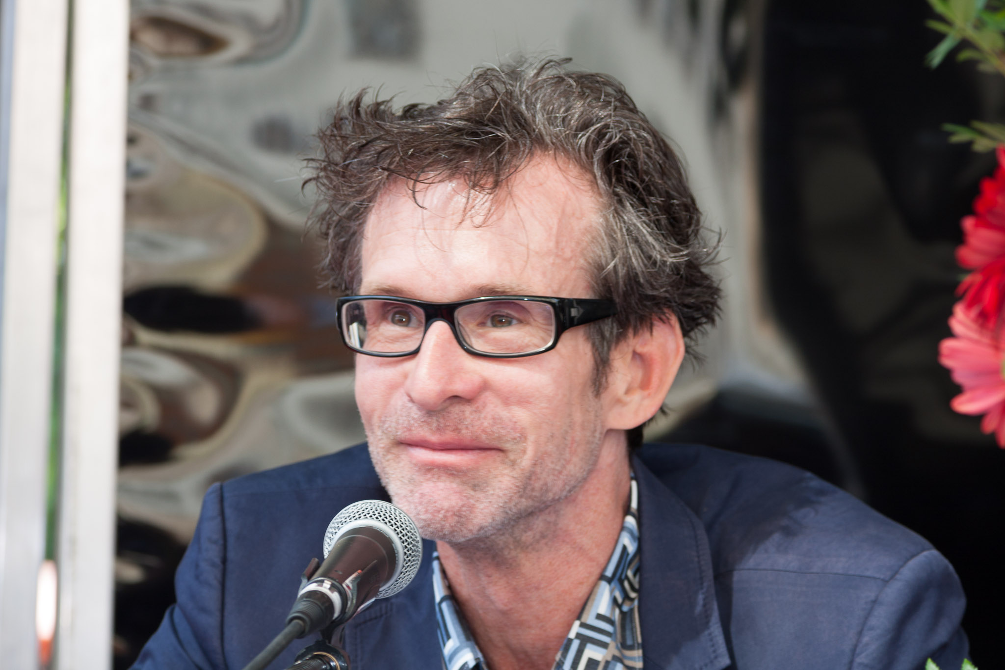 Ulrich Matthes bei einer Lesung des Anne Frank Tagebuches in Berlin